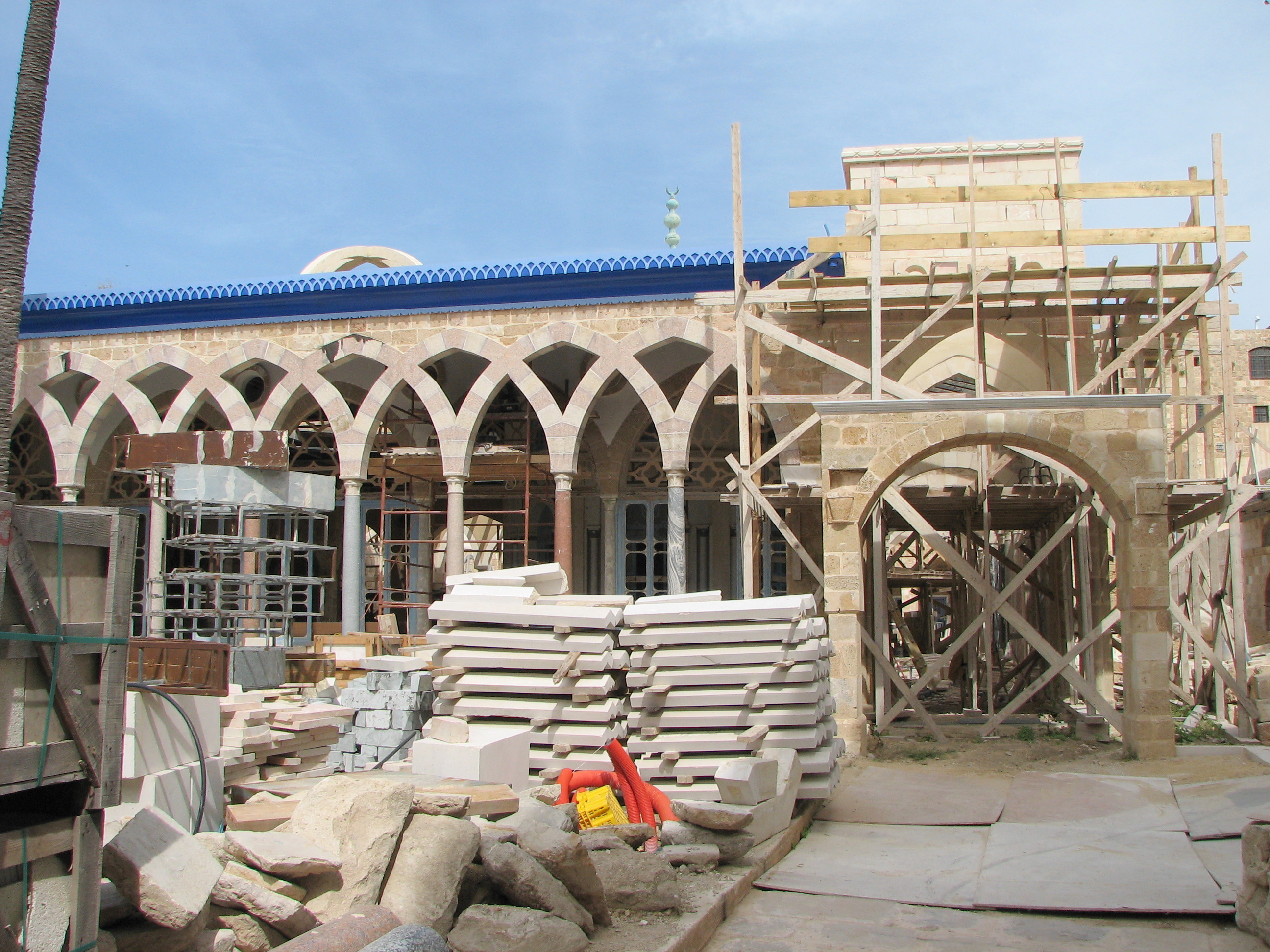 Akko, El Shazliya Mosque under construction. The cost of construction is estimate 80 M $ מסגד אל -שאזליה בעכו. מרכז השאזלים נמצא בלבנון. במשך שנים מרכז זה נזנח והשוכרים הרחיבו את בתיהם. השאזלים החליטו לשפץ אץ המקום הם פינו את הדיירים תוך מתן פיצויים והחלו בשיפוץ האתר הכולל מסגד מבנים וקברים. ההשקעה המוערכת במבנה באתר היא 80 מליון דולר This image was taken as part of the Elef Millim project trip to the Old City of Acco, which was held on Friday, 5th March 2010. To view all images uploaded as pary of the Elef Millim Project קירות פנימיים בזמן השיפוץ